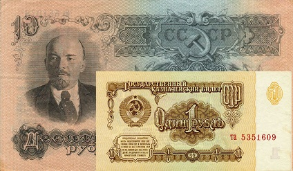 Сравнение 10 рублей обр. 1947 г. и 1 рубля обр. 1961 г.